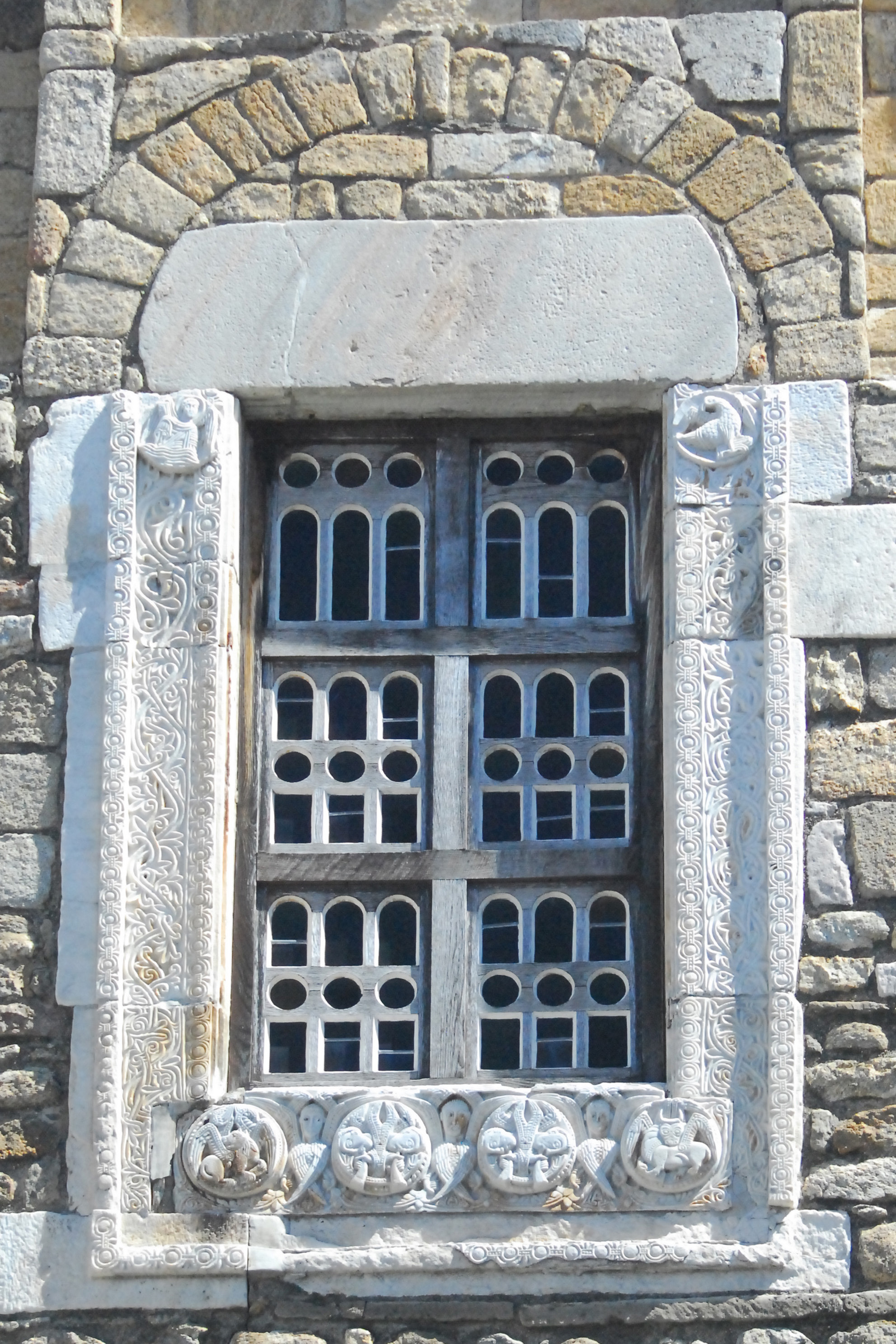 St-André-de-Sorède, Fassadenfenster